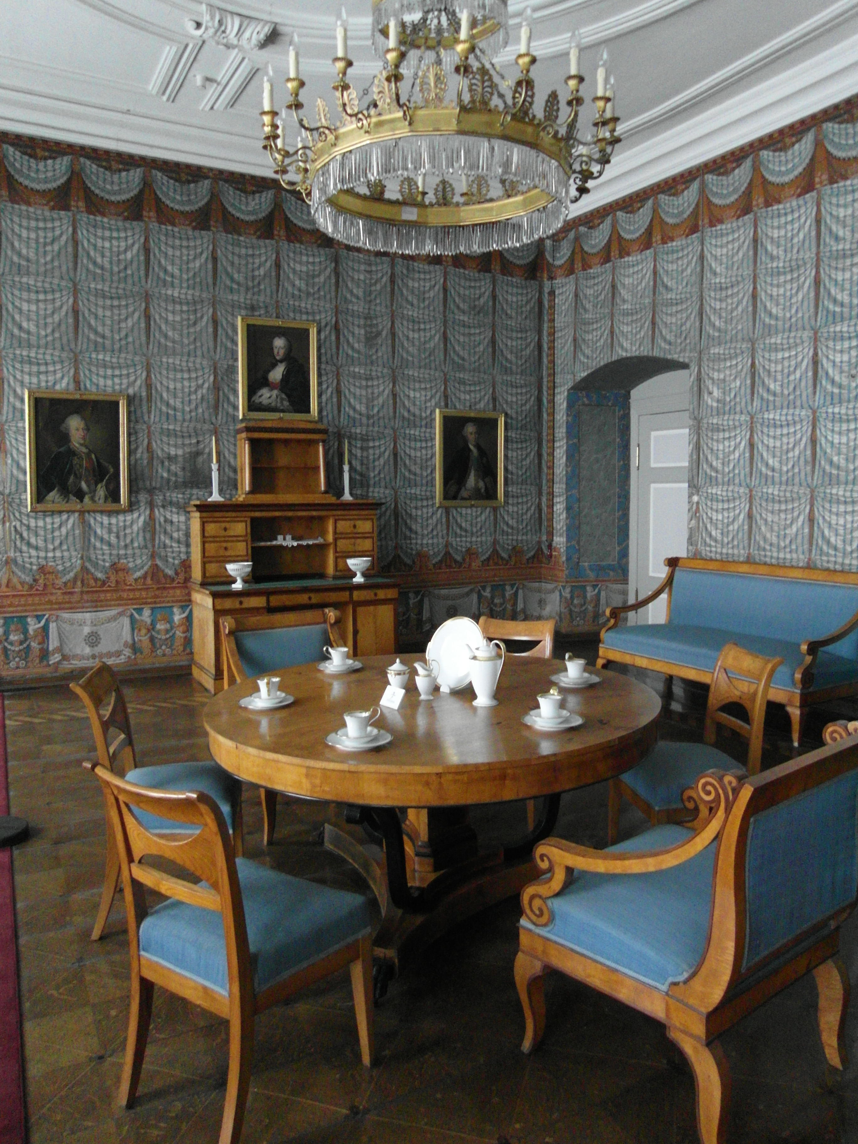 Der Blaue Salon im Westflügel des Schlosses Corvey